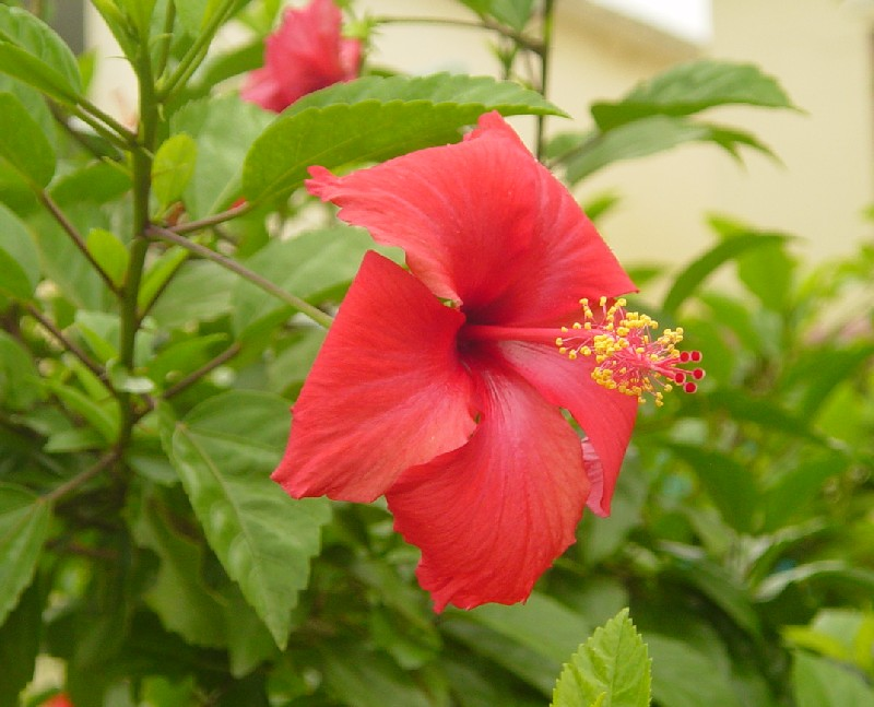 朱槿，又名扶桑，佛桑，大红花。学名：Hibiscus rosa-sinensis L.、英文名：Rose of China,China rose。拍摄：竹围墙(＾_＾) 03:11 2005年9月11日 (UTC)